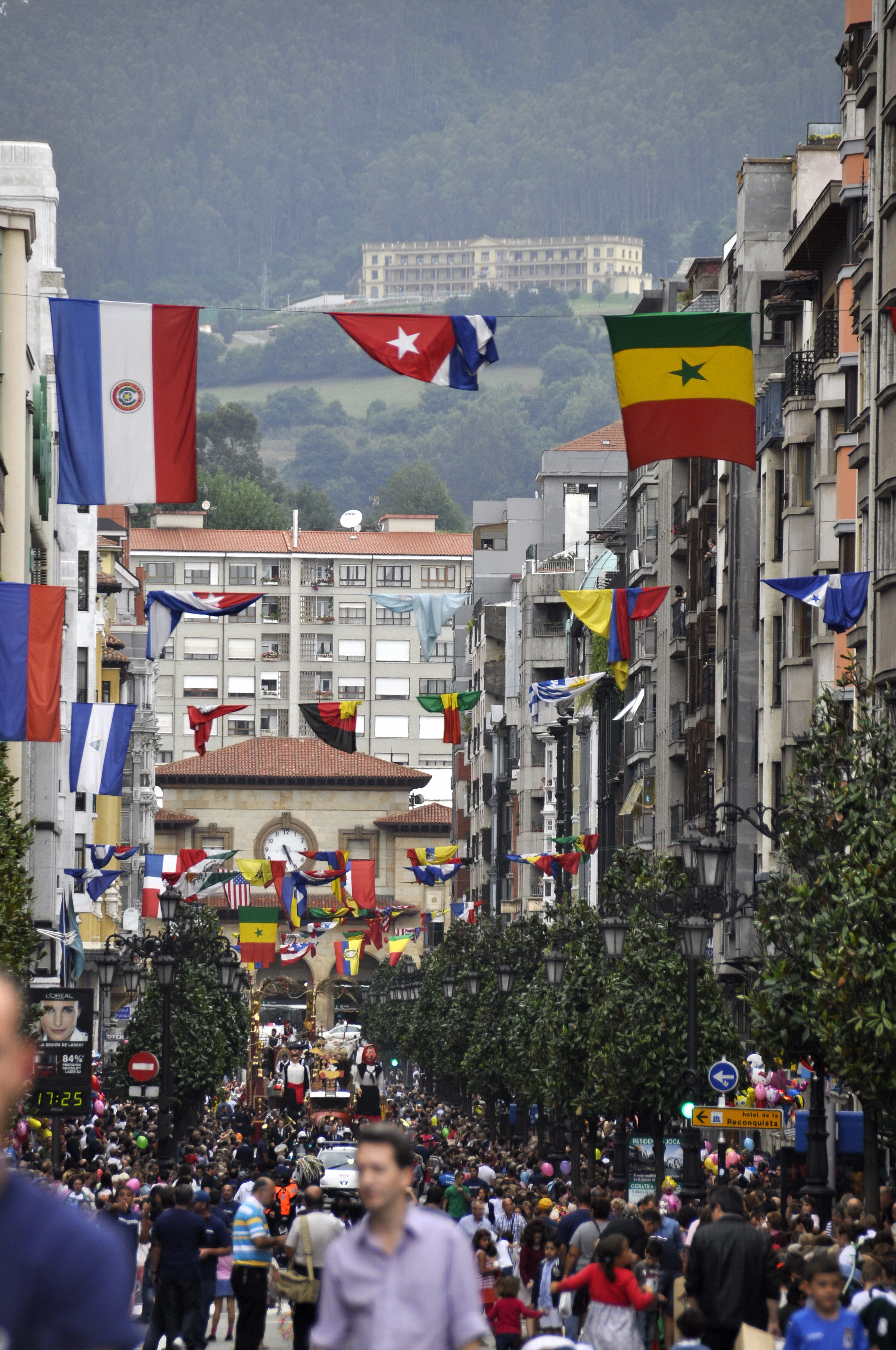 Día de América en Asturias-Oviedo, 2013